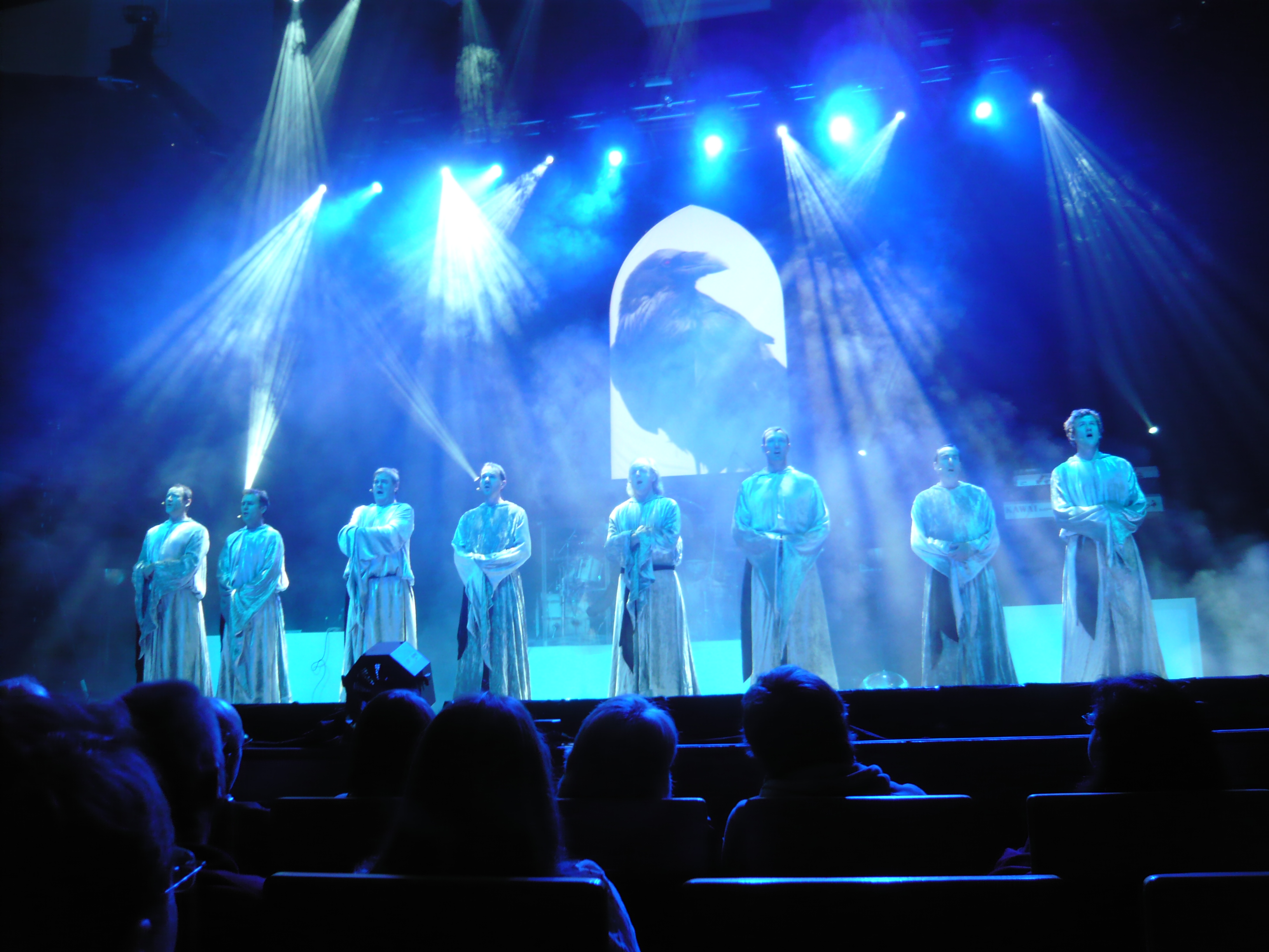 Gregorian und Amelia Brightman live im Konzerthaus Freiburg